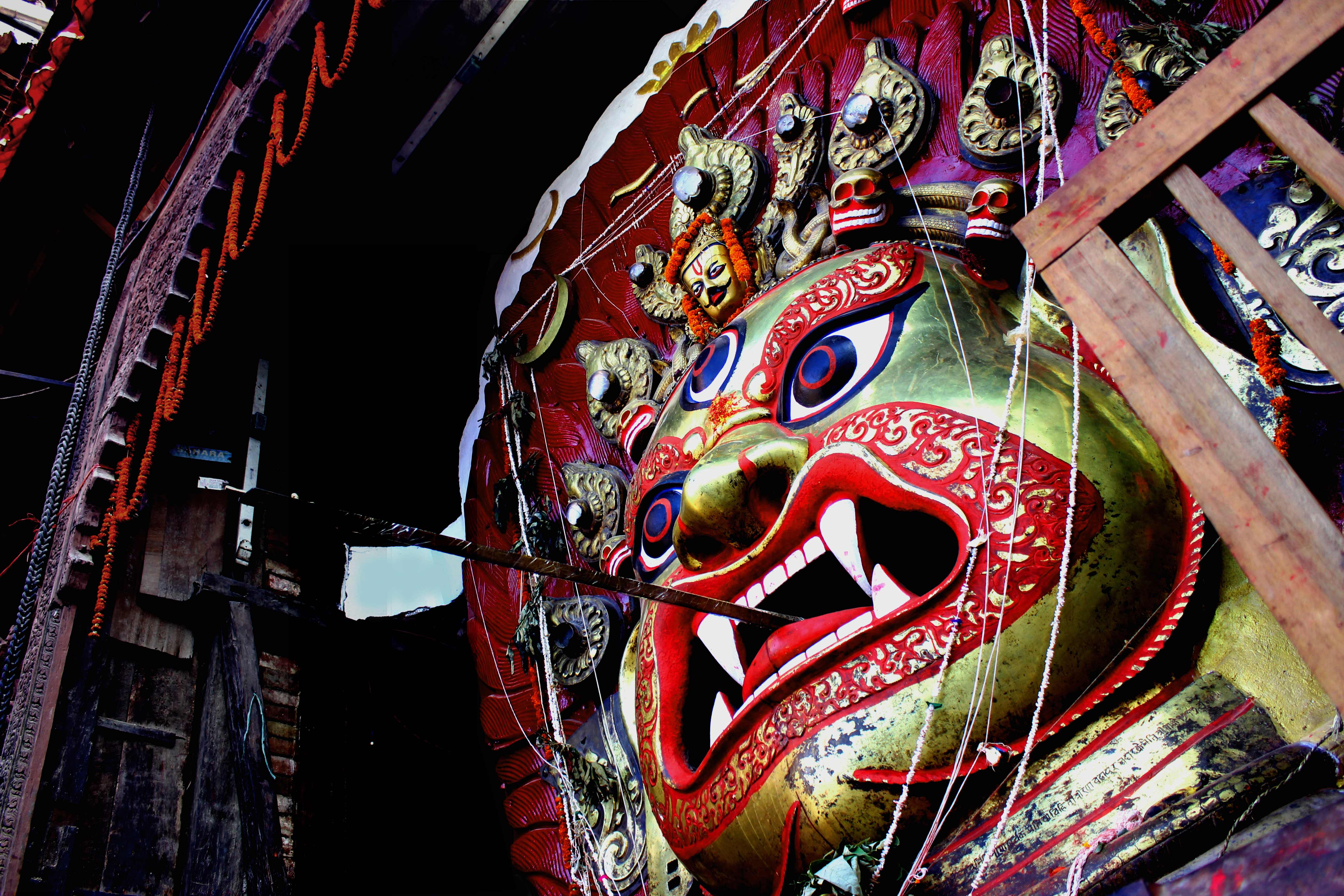 Mask of Sweta Bhairav at Basantapur, Kathmandu, Nepal.